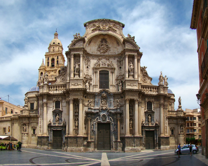 Catedral de Murcia, Región de Murcia, España.